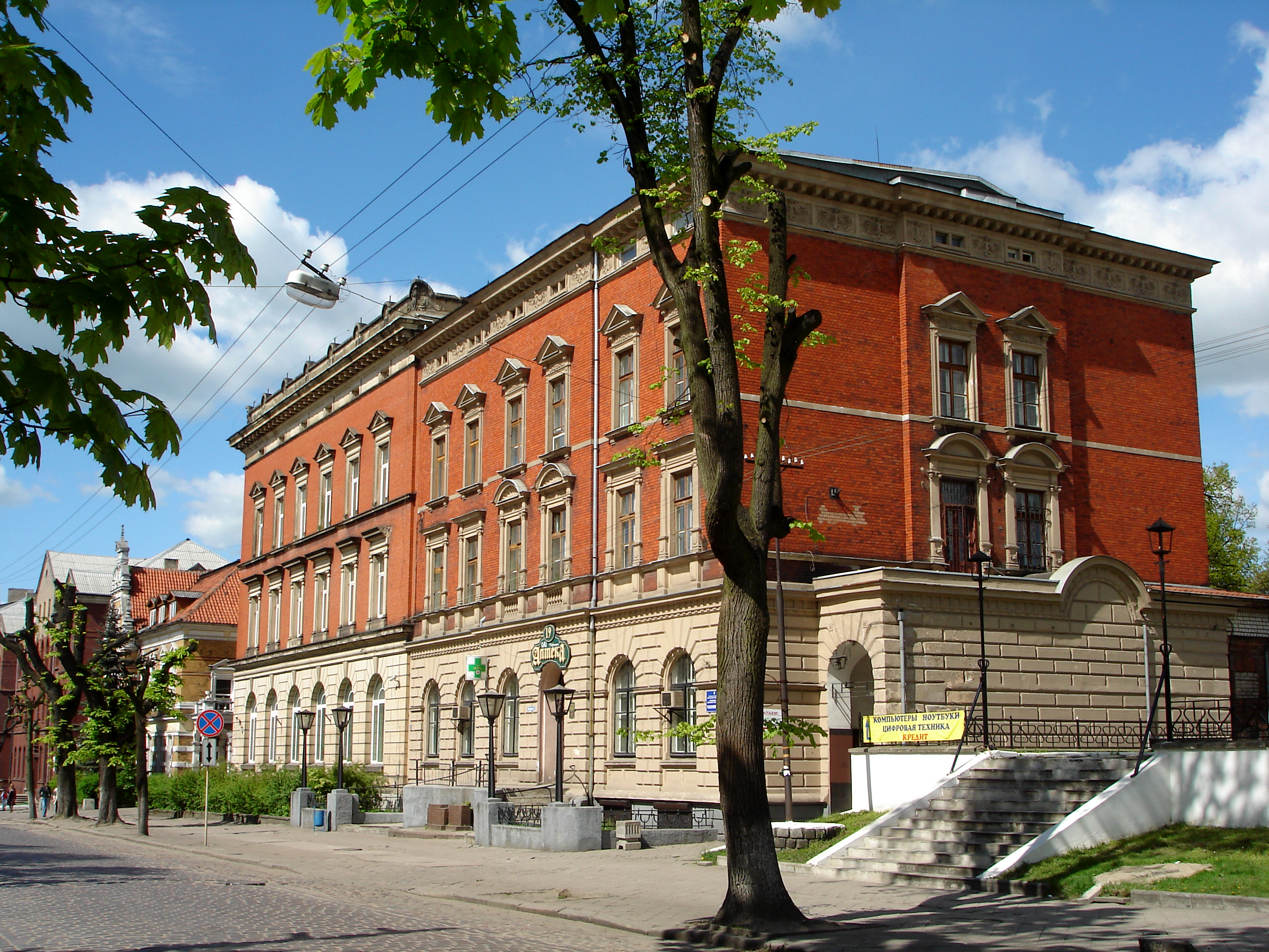 Gebäude in Tschernjachowsk (früher Insterburg) in der Oblast Kaliningrad, Russische Föderation.